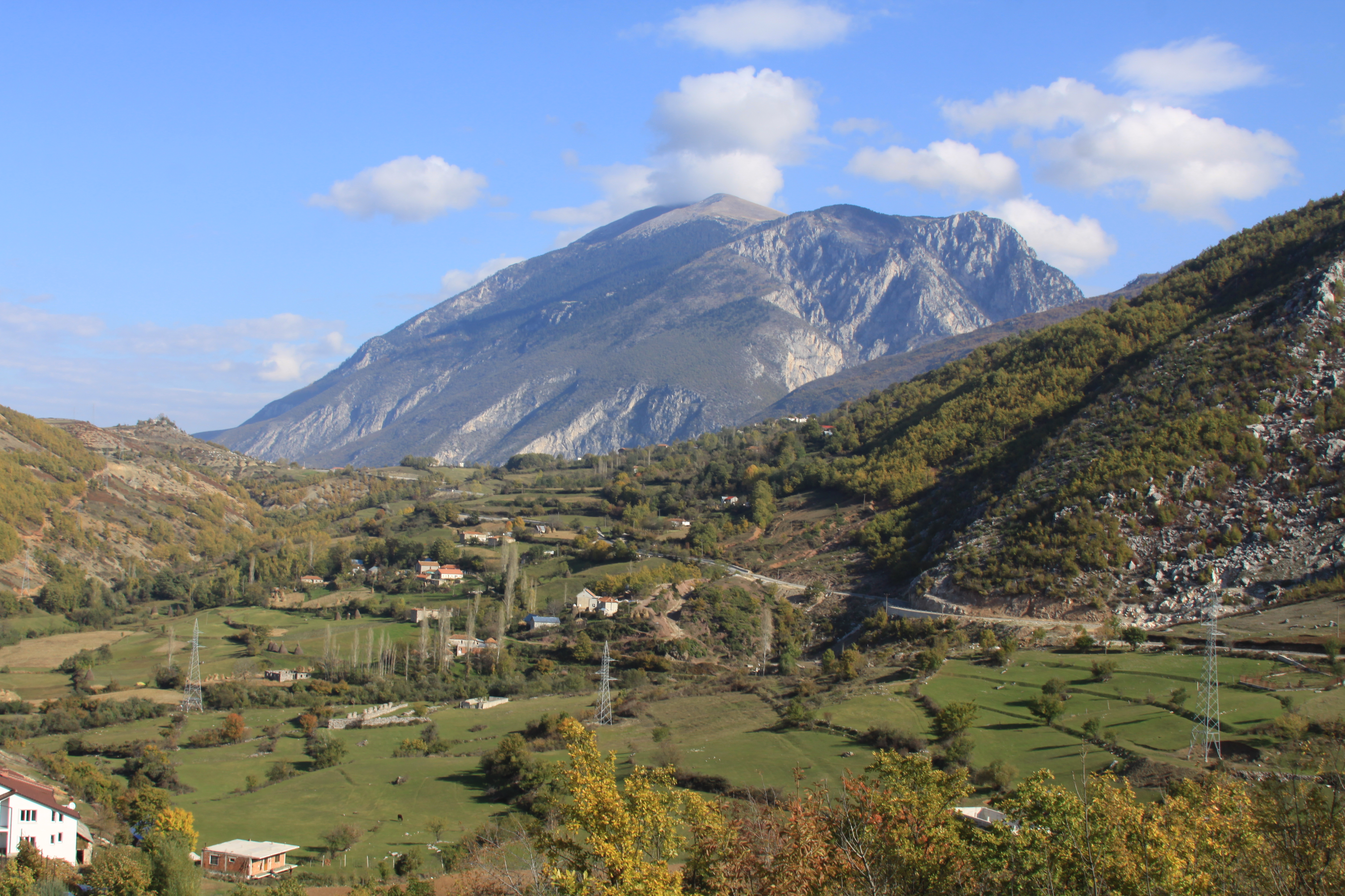 Pamje e Fshatit Domaj, Kukes